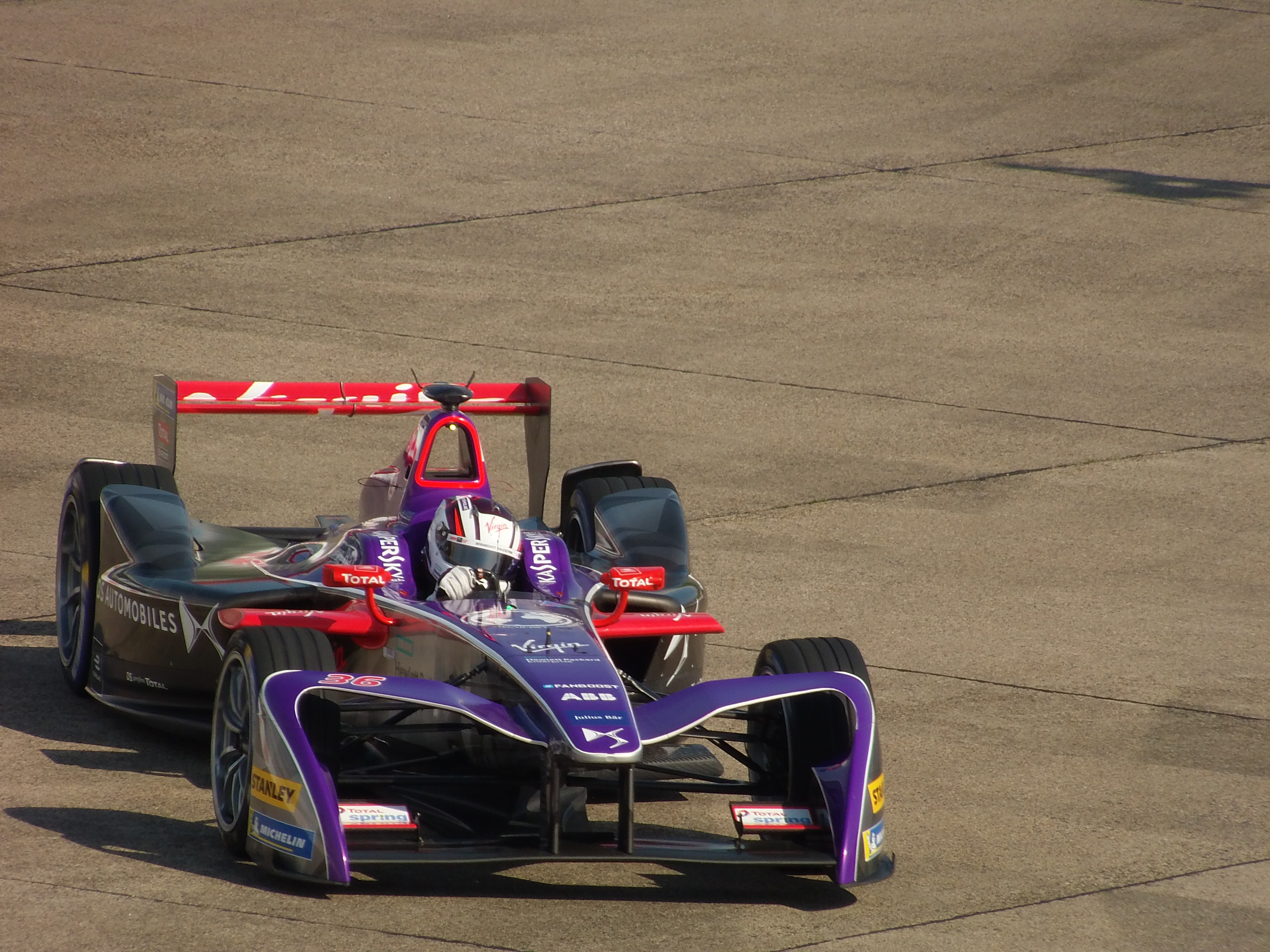 Alex Lynn im Virgin DSV-03 beim Berlin E-Prix 2018